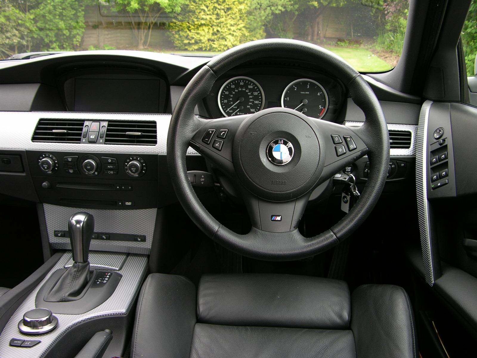 2006 BMW 535d M Sport